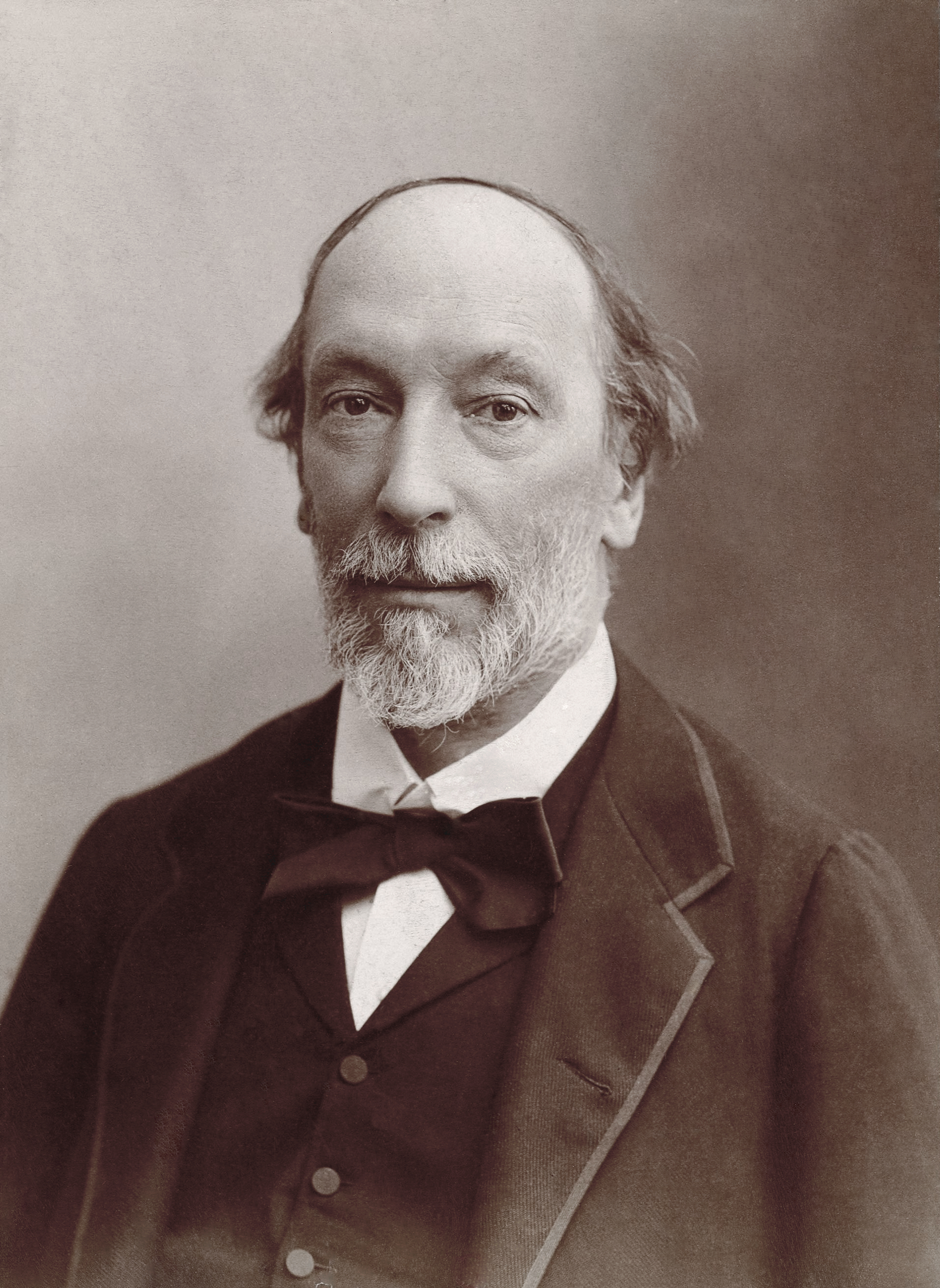 Auguste Vacquerie, (1819 - 1895) écrivain français